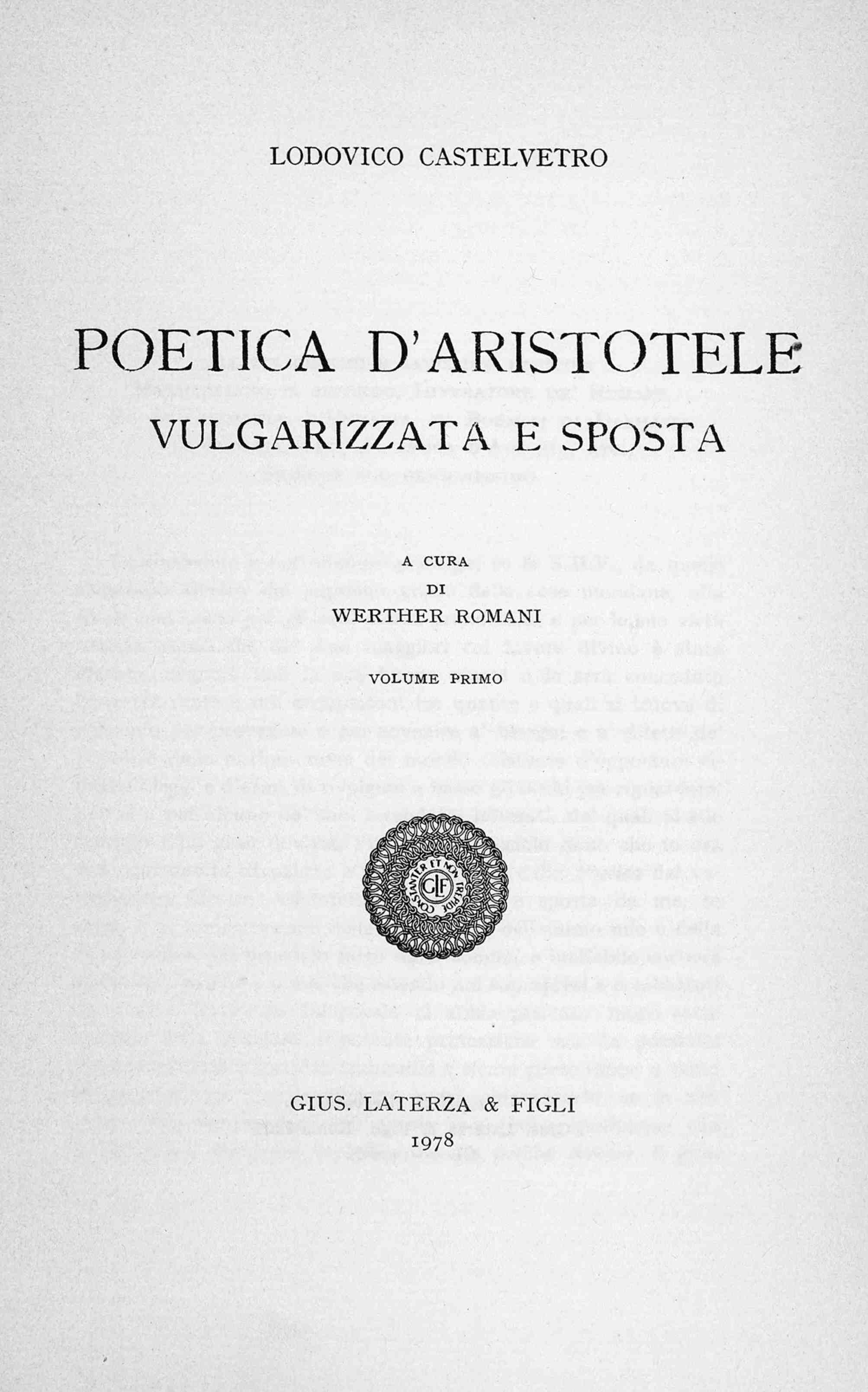 Poetica d'Aristotele vulgarizzata e sposta. 1 / Lodovico Castelvetro ; a cura di Werther Romani. - Roma ; Bari : Laterza, 1978. - 549 p. ; 22 cm. - (Scrittori d'Italia ; 264) . Frontespizio